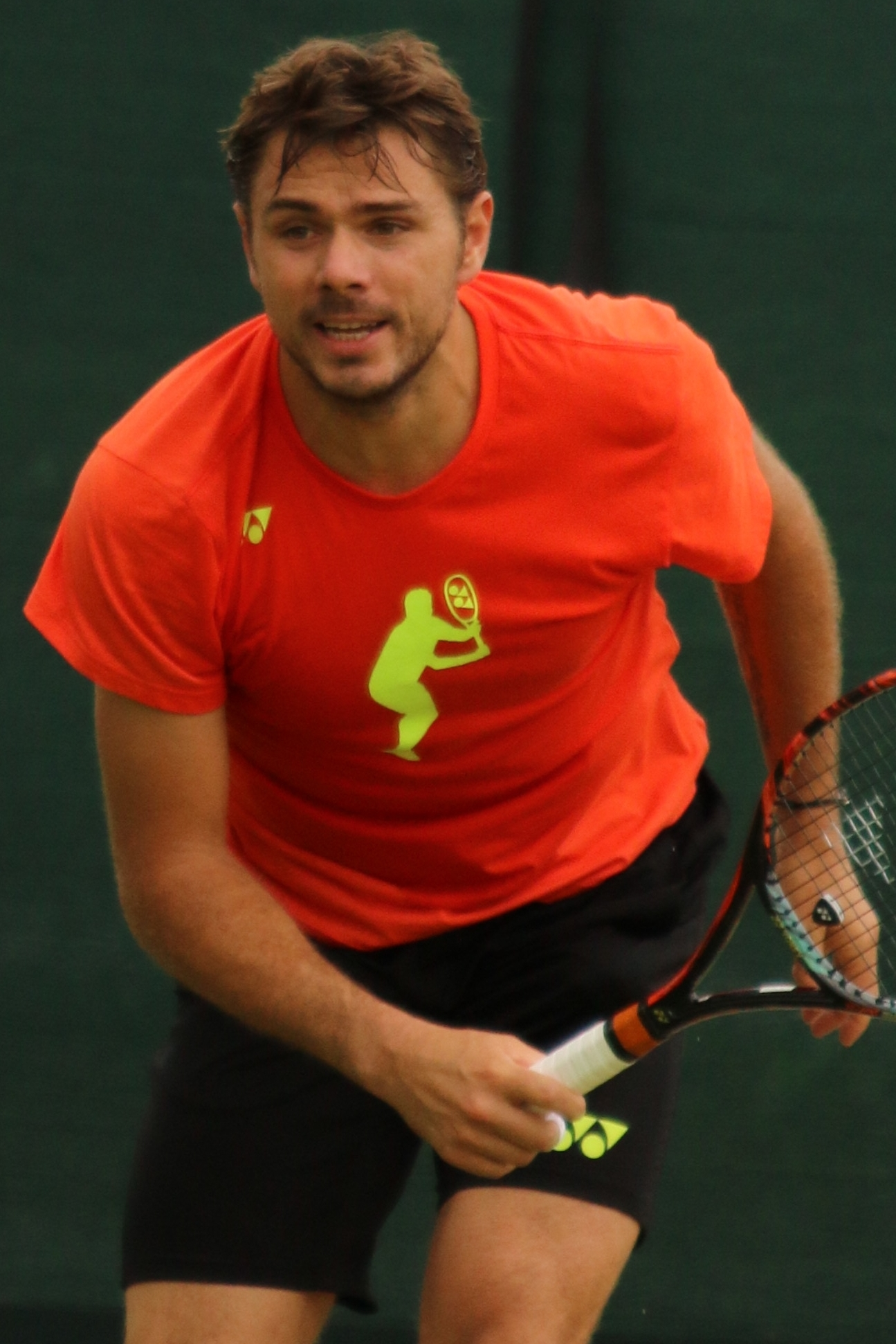 Wawrinka WM16 (2)